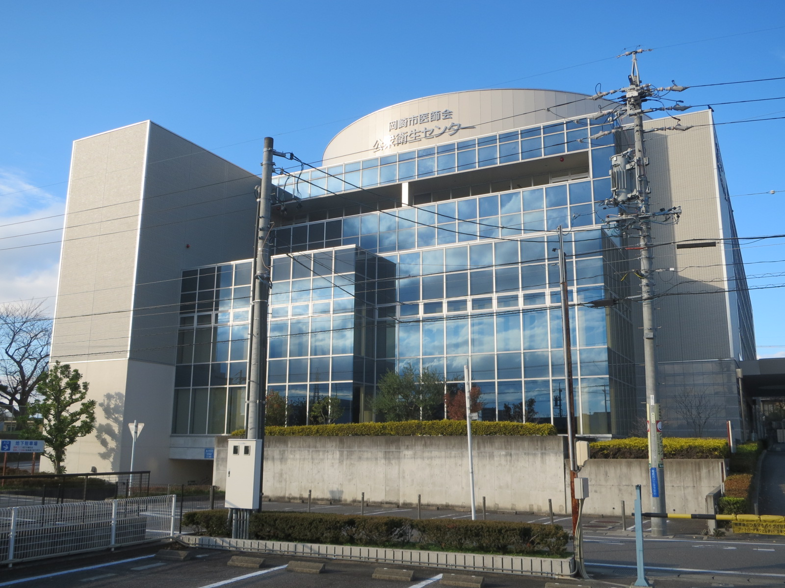 岡崎市医師会 公衆衛生センター